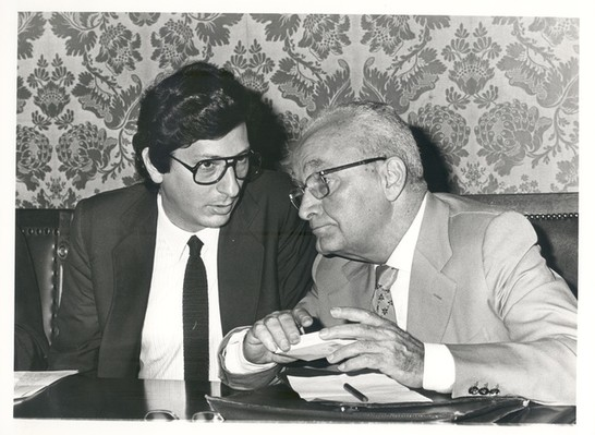 Politico italiano